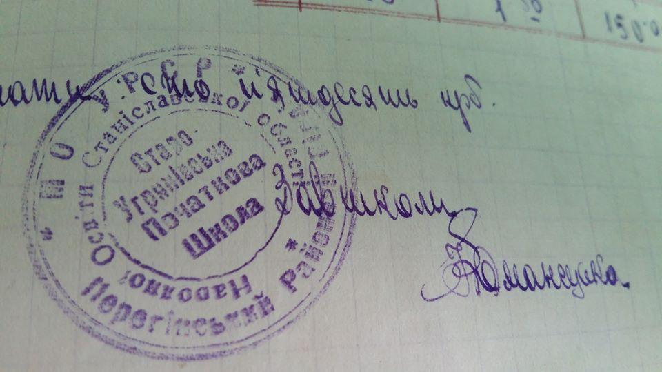 фотокопія шкільної печатки